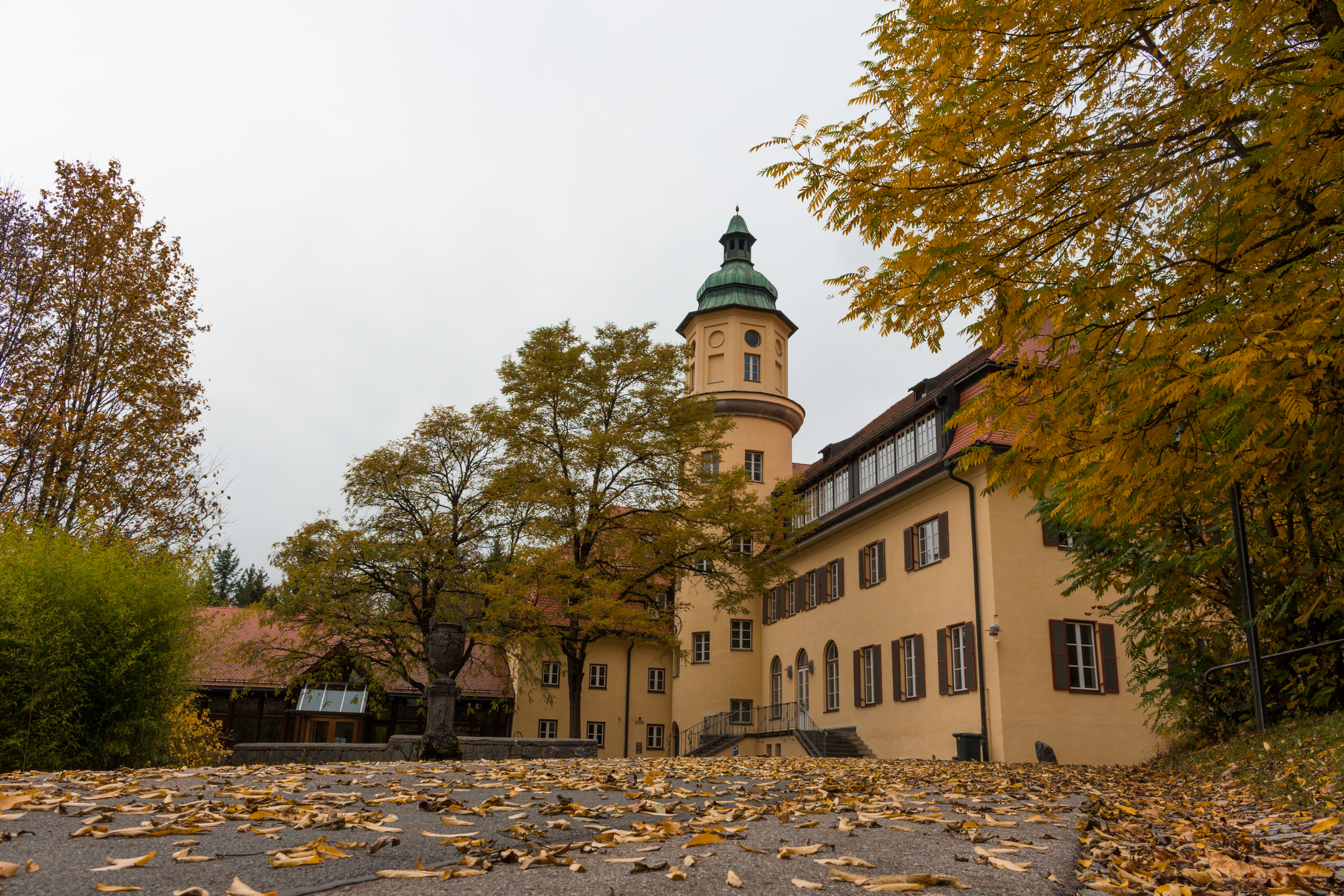 Blick auf das neue Schloss, wo sich heute die Räumlichkeiten des LSH befinden.